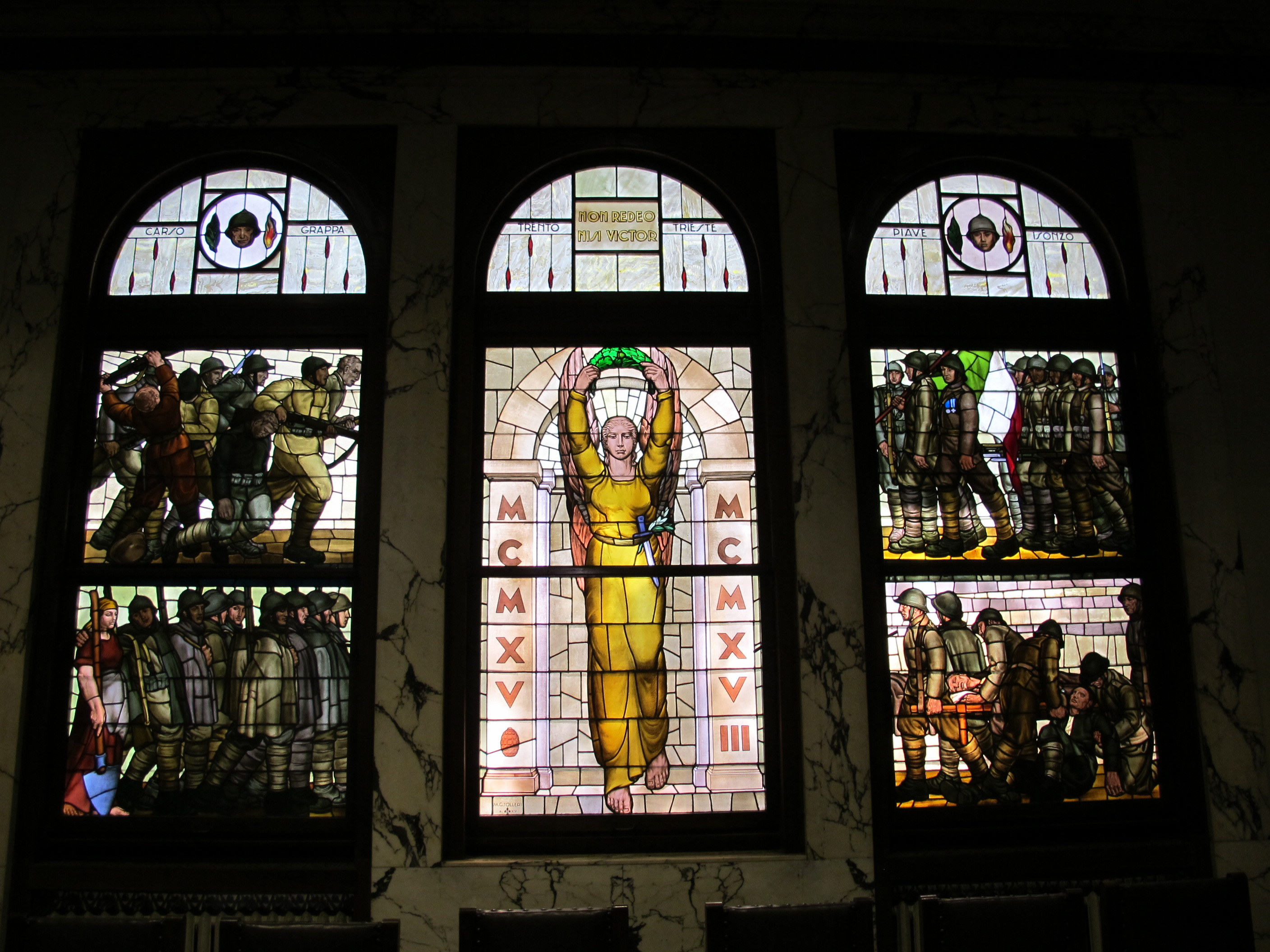 Casa del mutilato fi, sala, vetrata